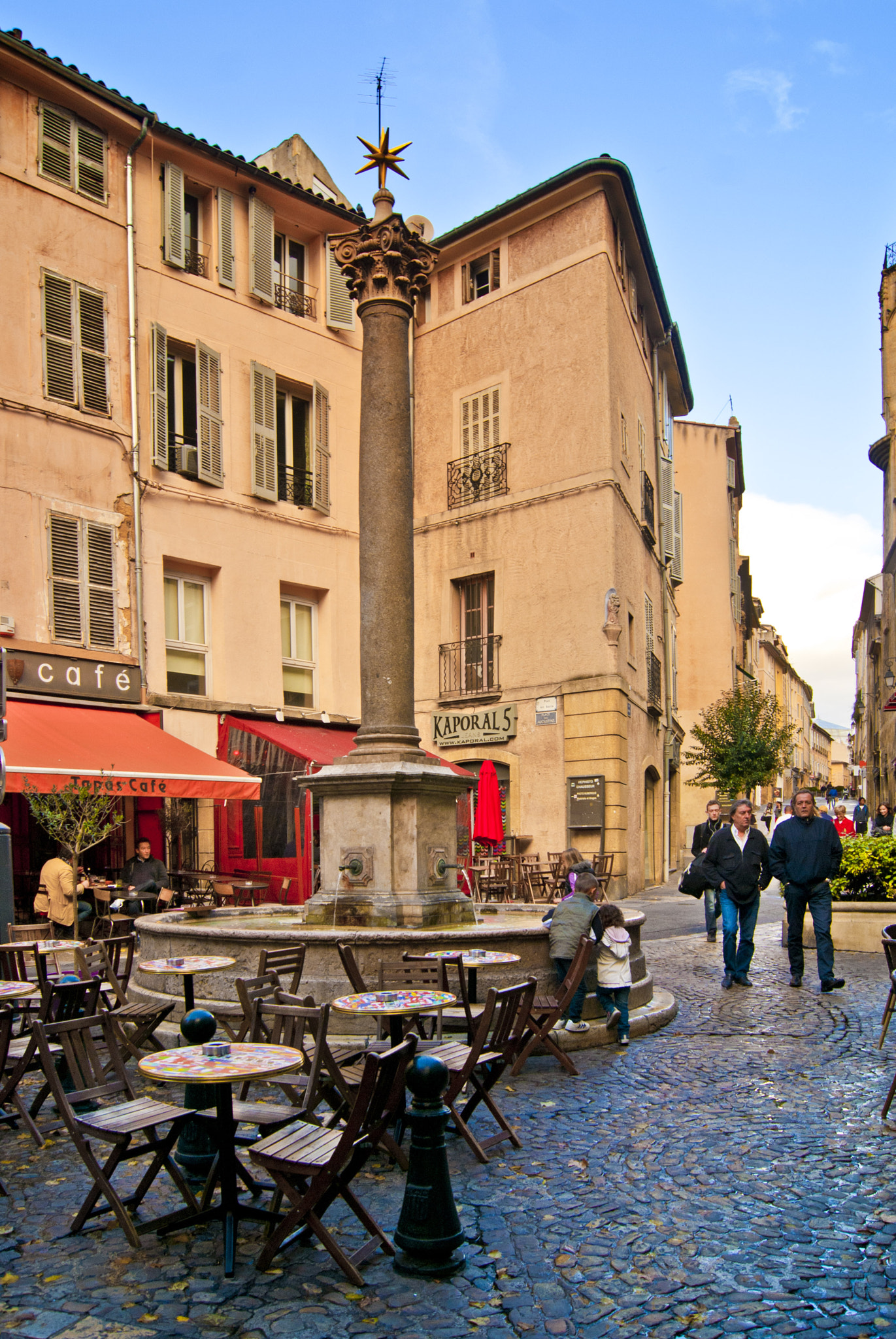 500px provided description: SONY DSC